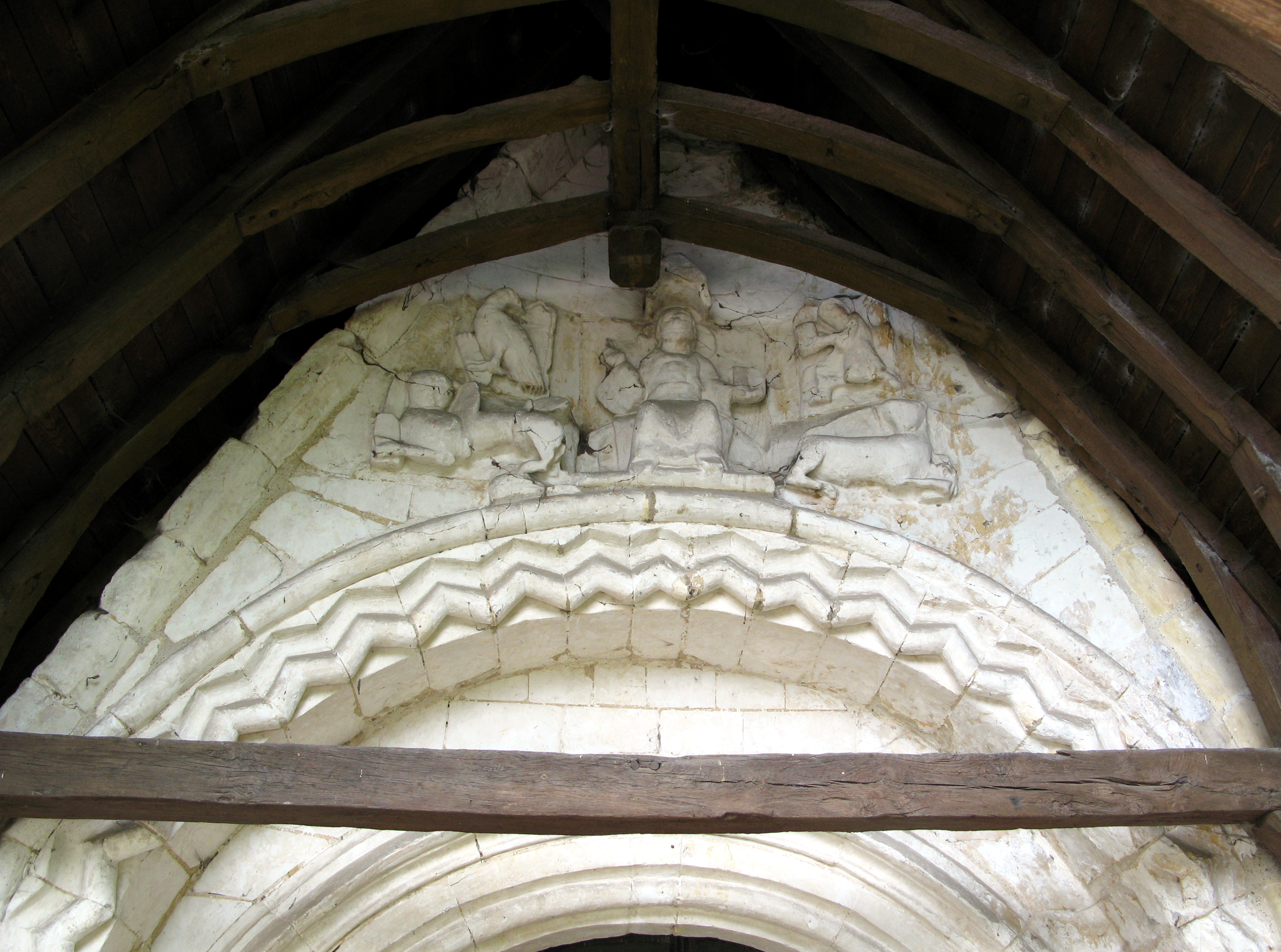 Mareuil-Caubert (Somme, France) - Le tympan de l'église. Jésus, assis, est entouré de la représentation symbolique des 4 Évangiles.